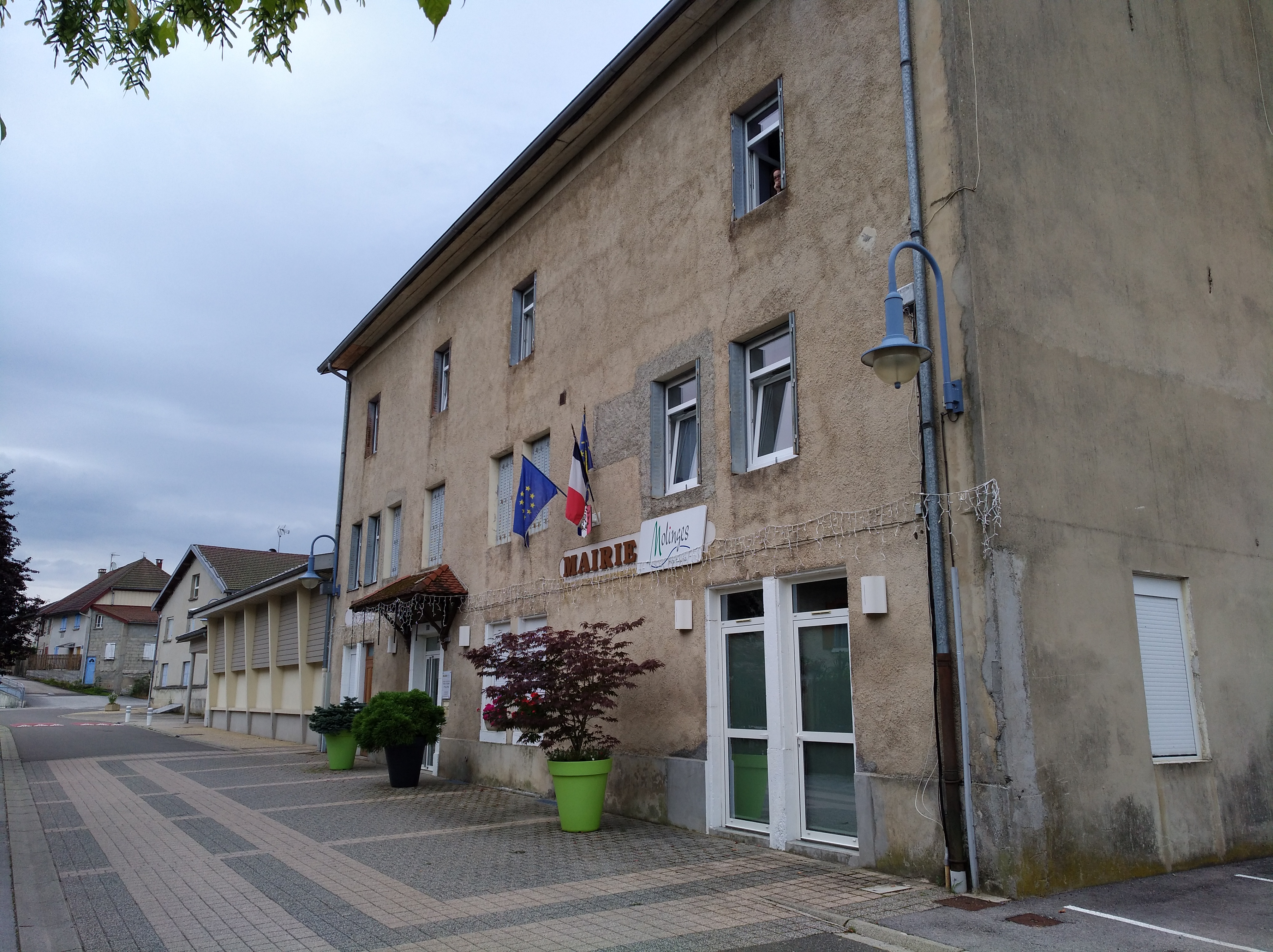 Mairie de Molinges (Jura, France).